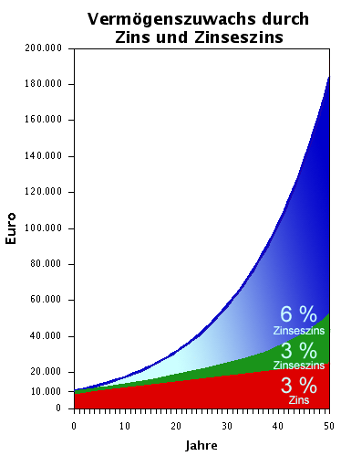 Grafik